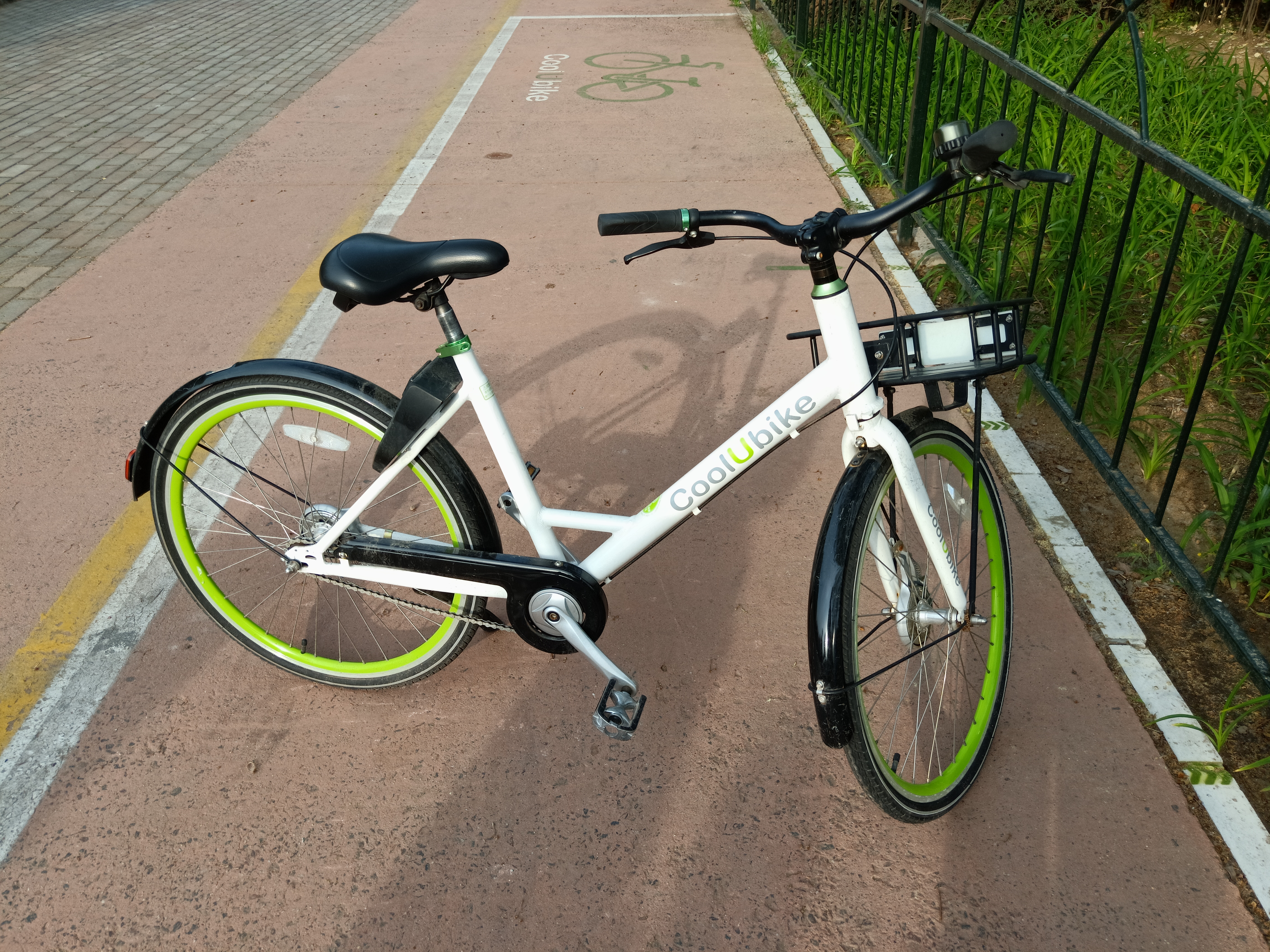 粵語: 喺北戴河奧林匹克大道公園南門停低嘅酷遊單車